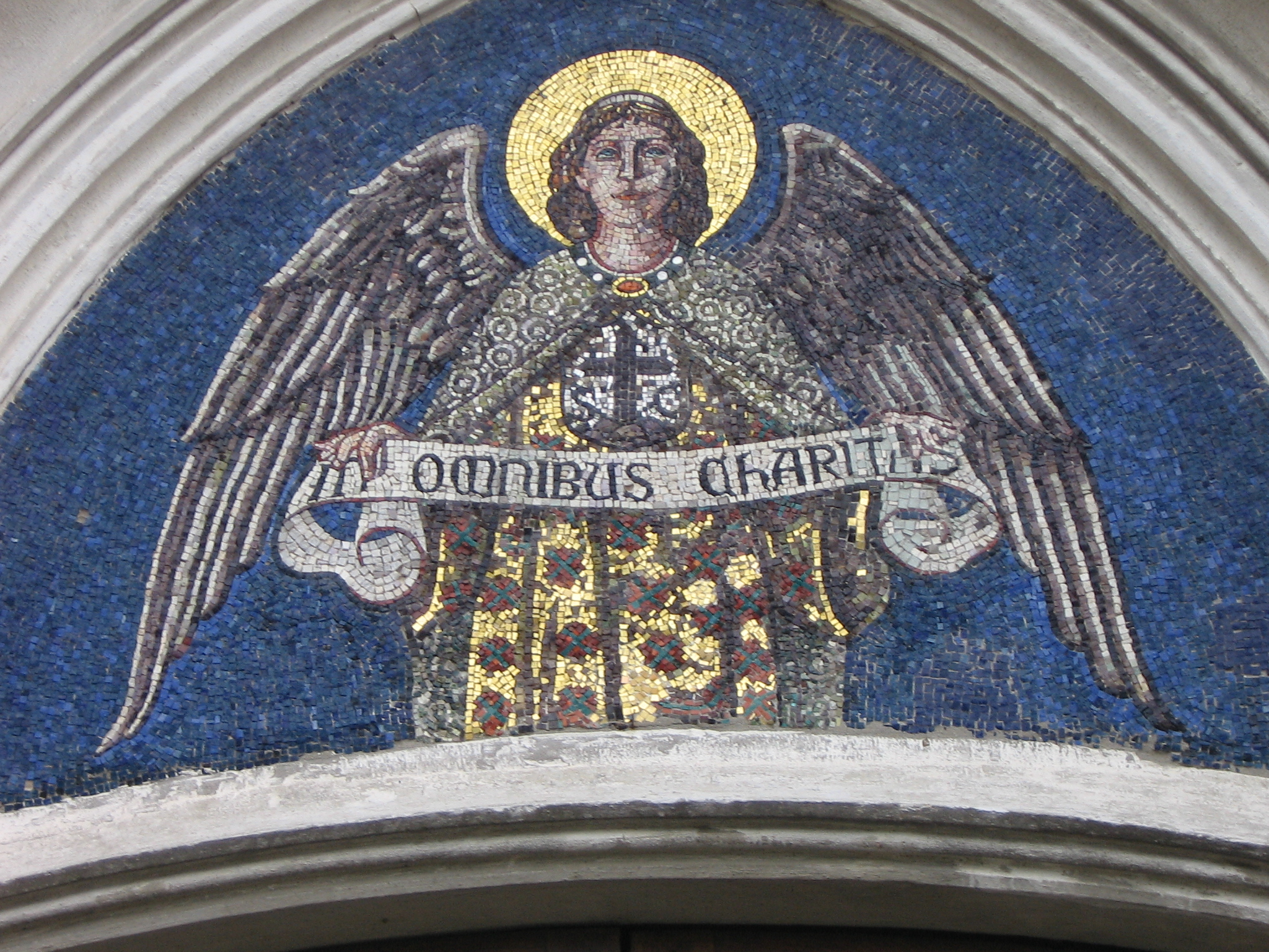 Chiesa della Nostra Signora del Sacro Cuore; particolare di mosaico. Gatteo (FC), Italia.